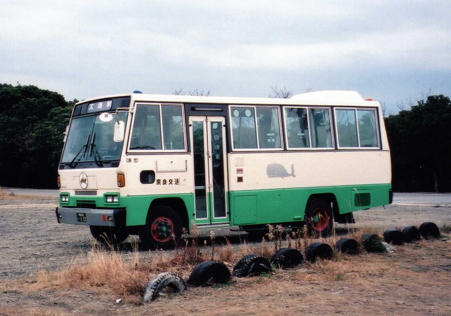 Nara Kotsu Isuzu P-MR112F at Taiji Town